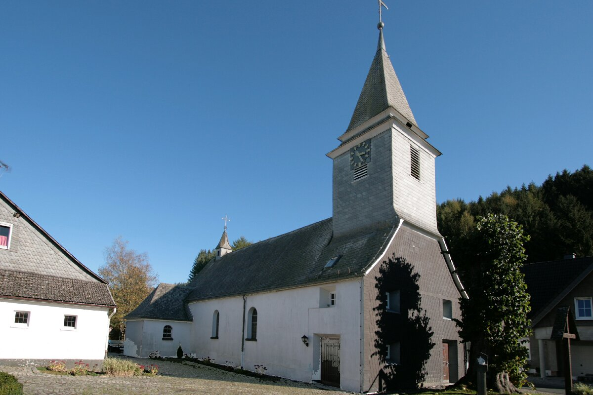 St. Antonius Kirche in Arpe